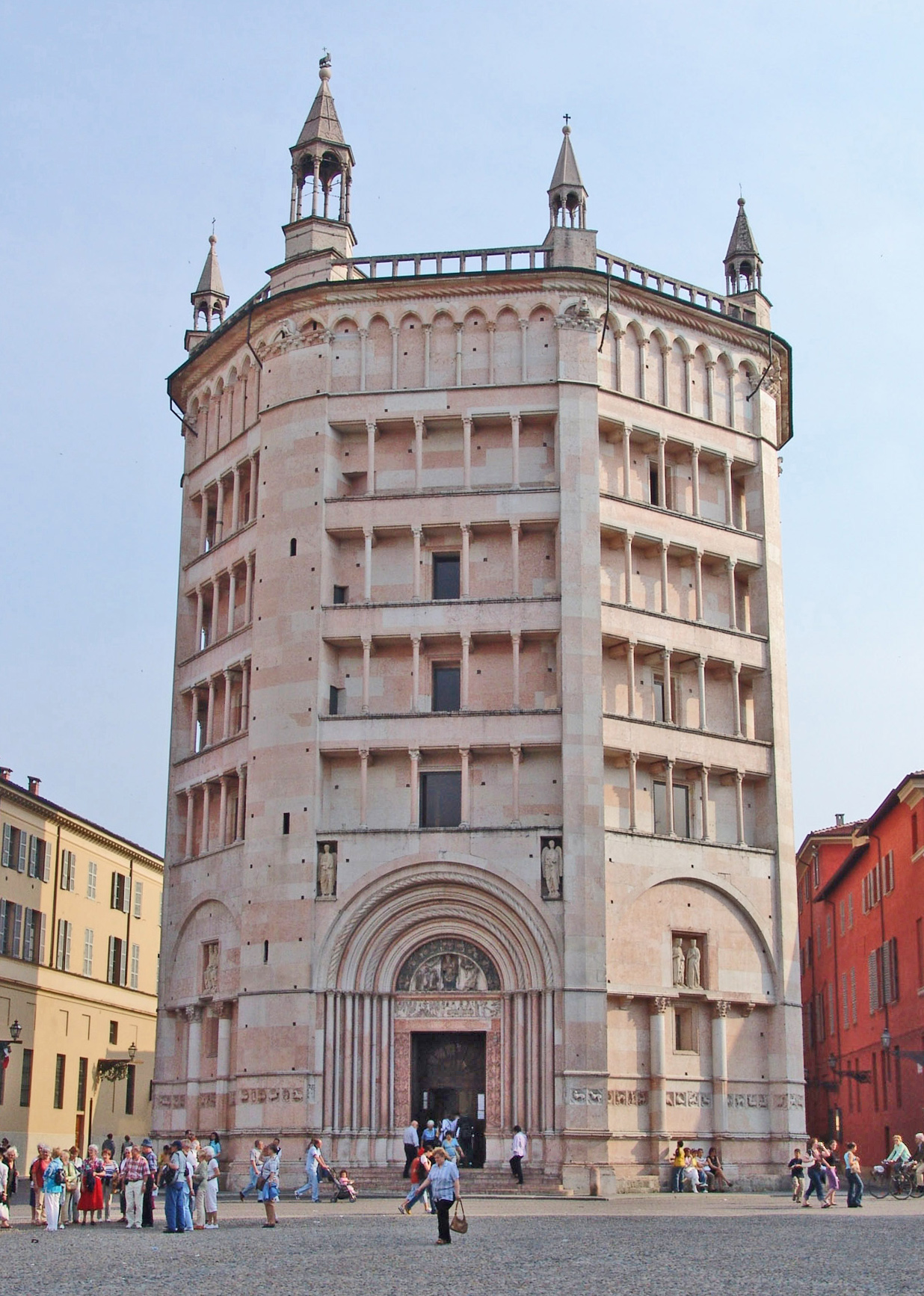 Battistero zu Parma Source:Eege Foto vum Philip Schäfer